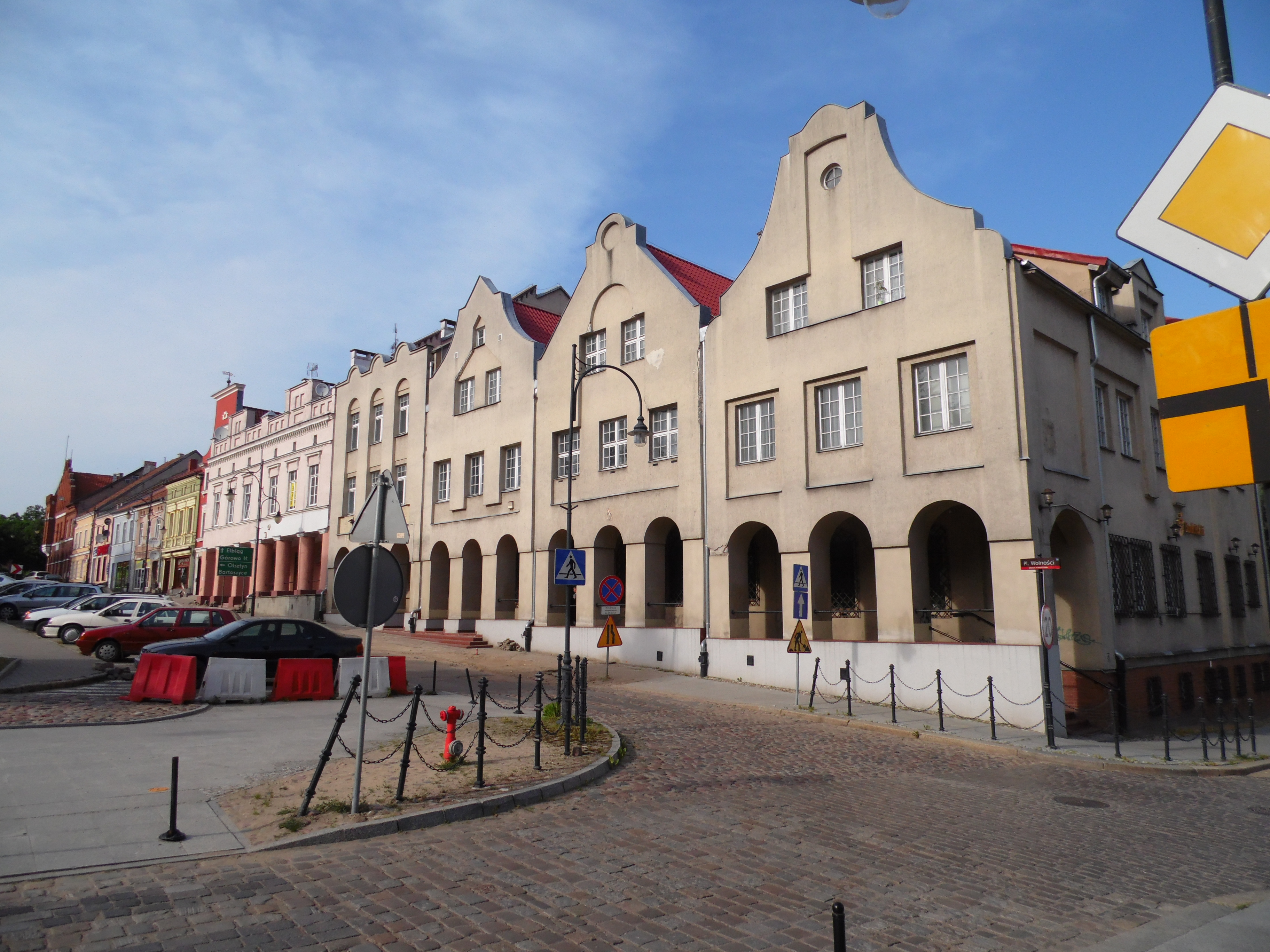 ZABYTKOWE KAMIENICE W RYNKU.